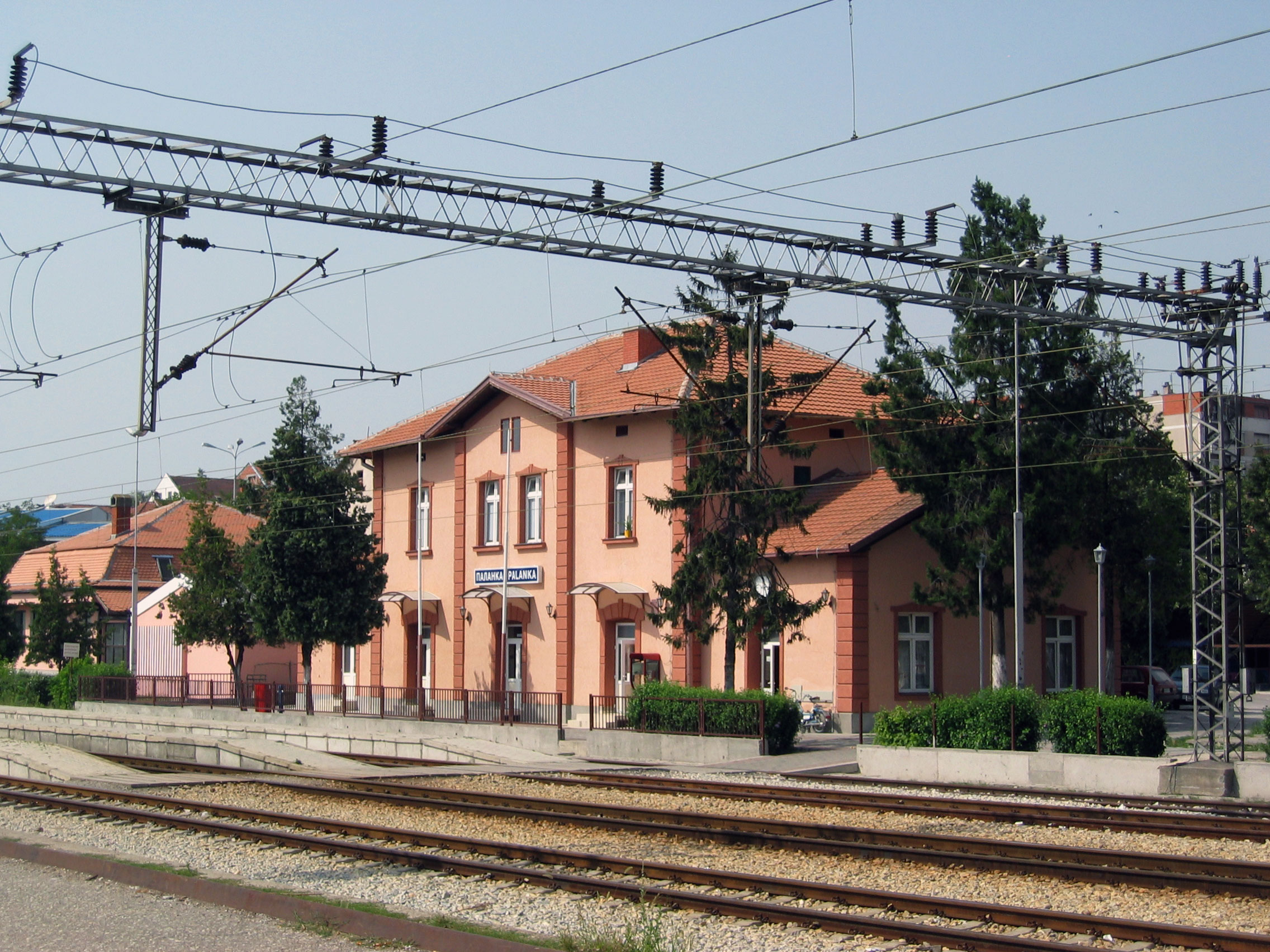 Железничка станица у Смедеревској Паланци